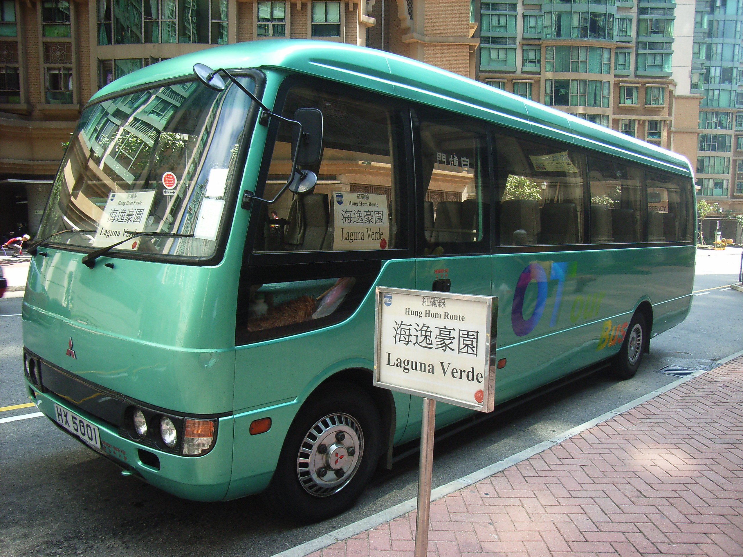 香港穿梭巴士往來尖沙咀中間道及海逸豪園海逸道兩地之間，每天下午免費服務。